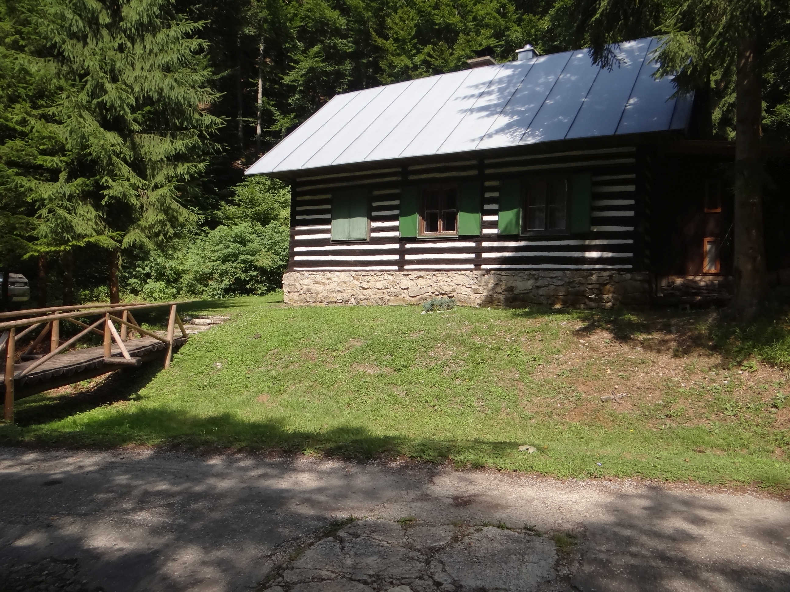 Jasenská dolina.